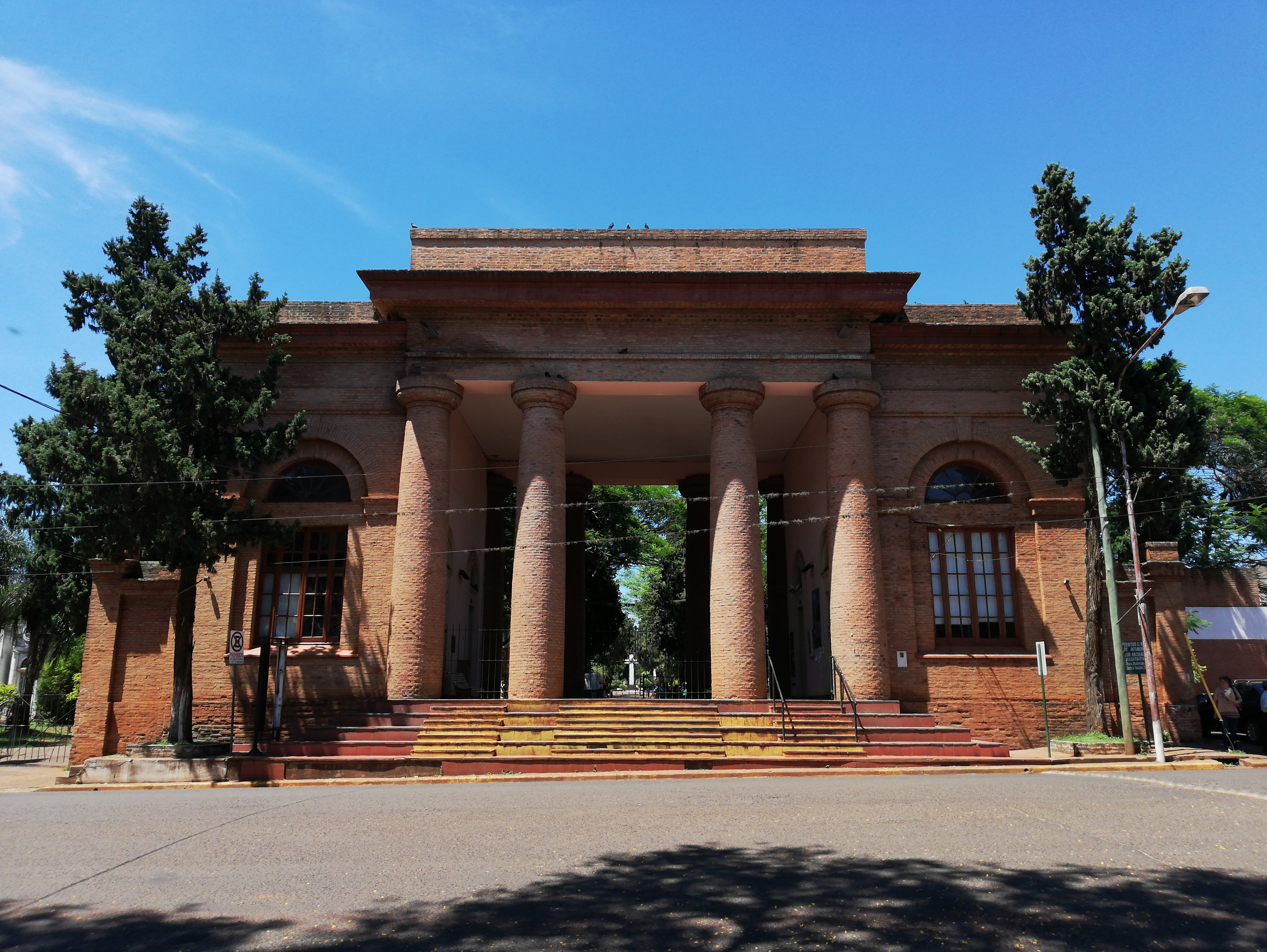 Cementerio La Piedad (Posadas)